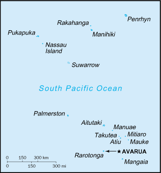 庫克群島地圖 from EN wiki